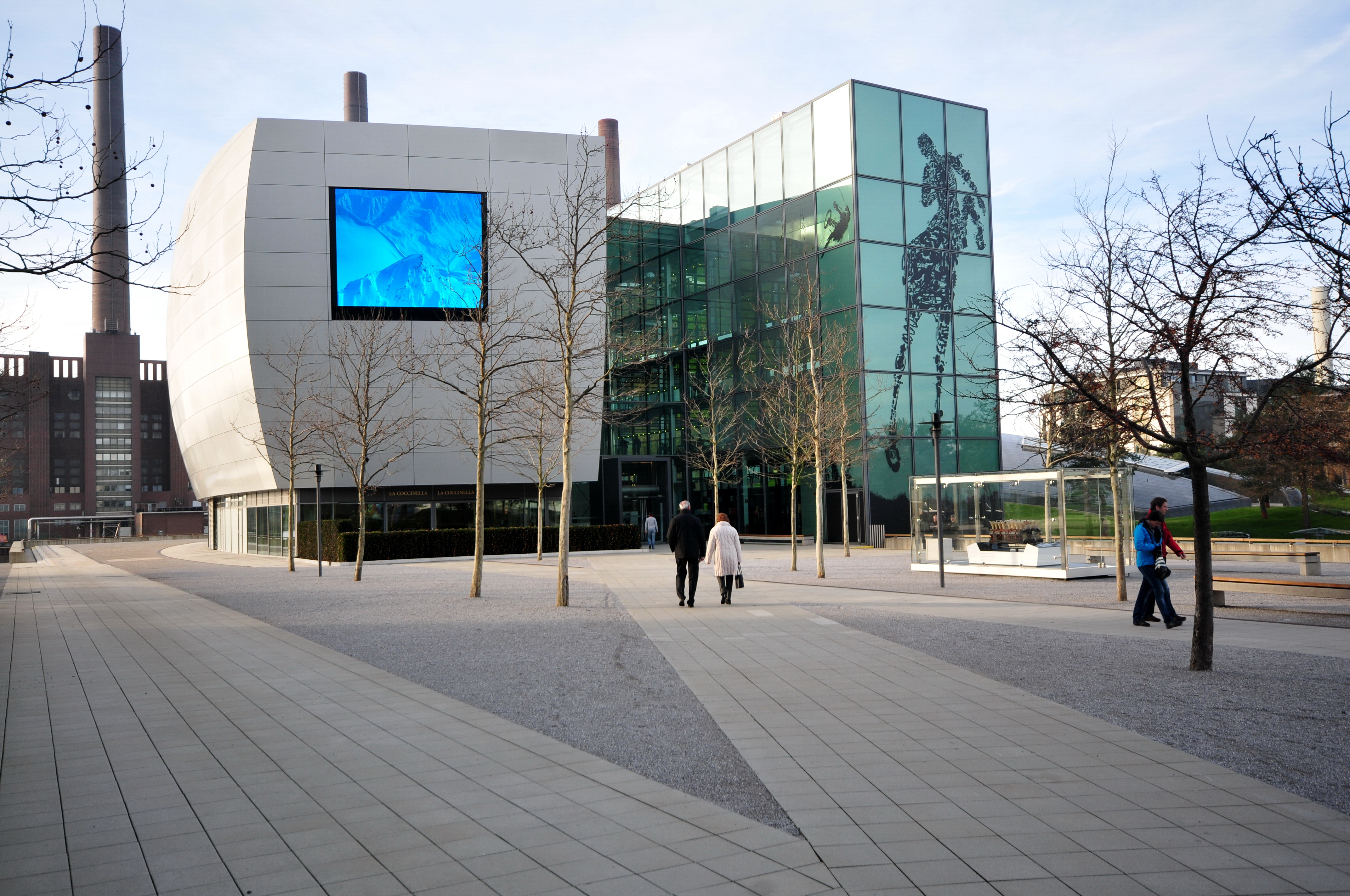 Zeithaus in der Autostadt Wolfsburg